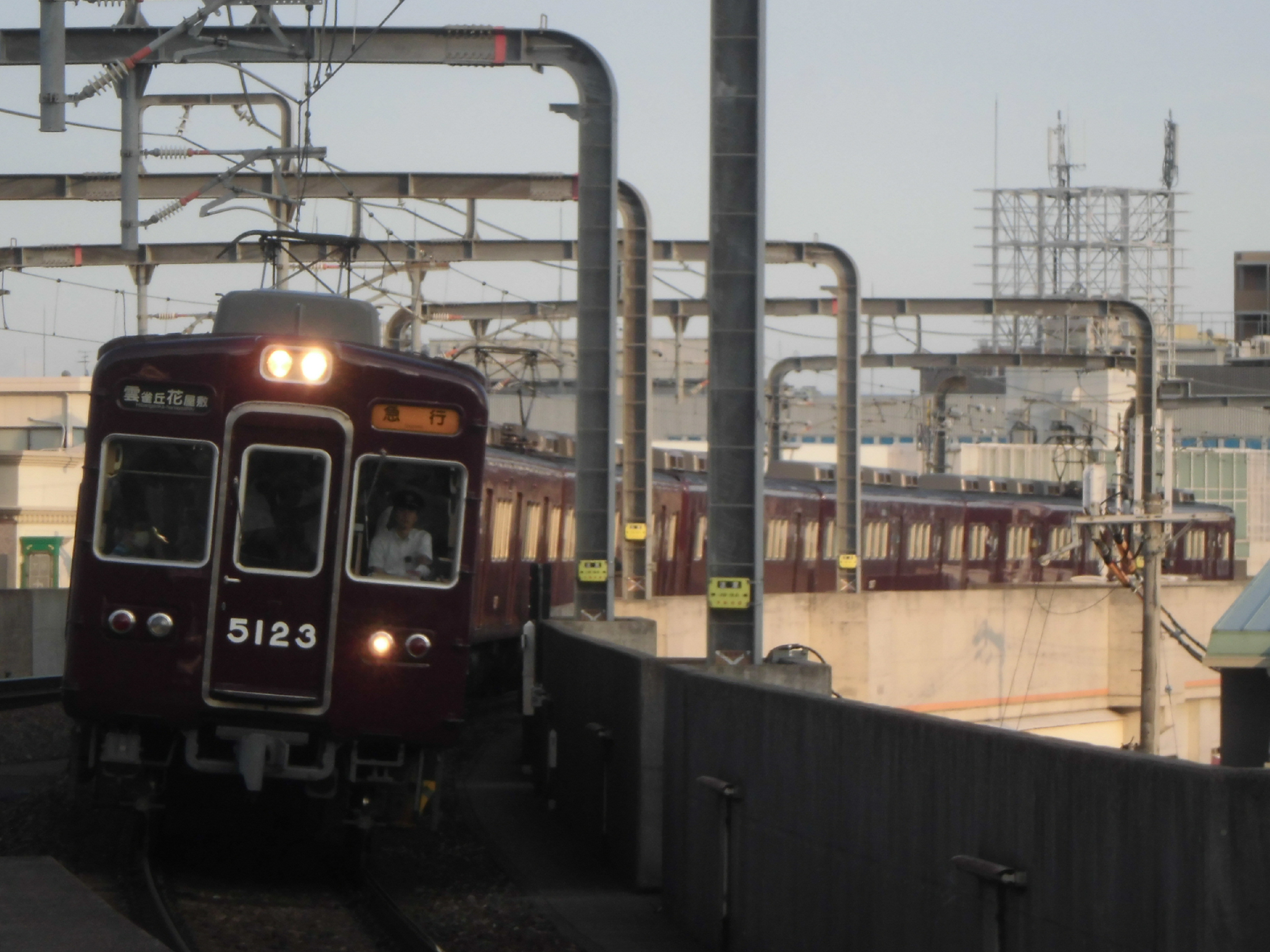 阪急5100系5106F